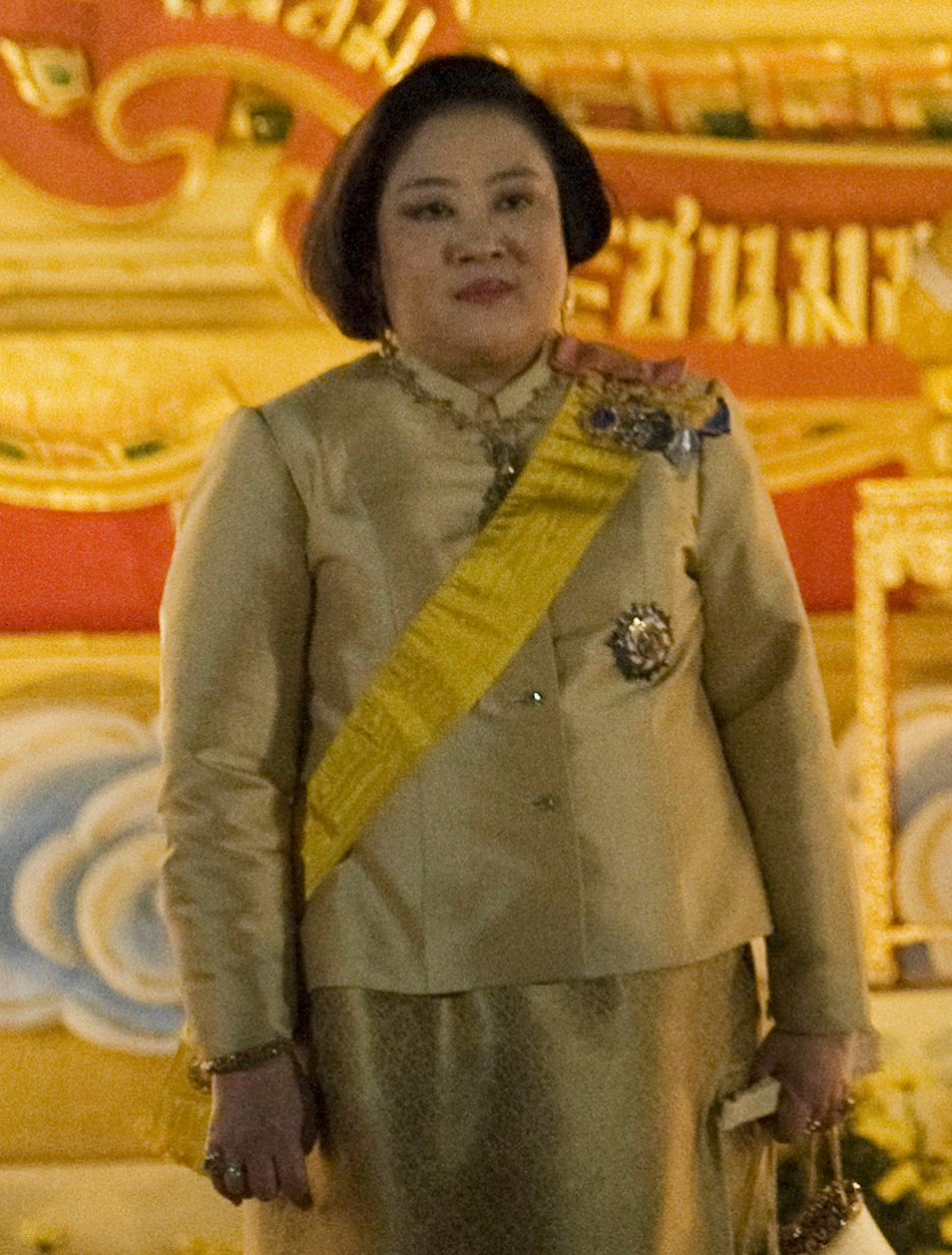 นายกรัฐมนตรี และภริยา เฝ้าฯ รับเสด็จ สมเด็จพระเทพรัตนราชสุดาฯ สยามบรมราชกุมารี เสด็จพระราชดำเนินพร้อมด้วยพระบรมวงศานุวงศ์ในงานสโมสรสันนิบาตเฉลิมพระเกียรติพระบาทสมเด็จพระเจ้าอยู่หัว เนื่องในโอกาสมหามงคลเฉลิม พระเกียรติพระชนมพรรษา วันอังคารที่ 7 ธันวาคม พ.ศ.2553 (Photographer attached to the Prime Minister of the Kingdom of Thailand : Peerapat Wimolrungkarat / พีรพัฒน์ วิมลรังครัตน์) @is50mm